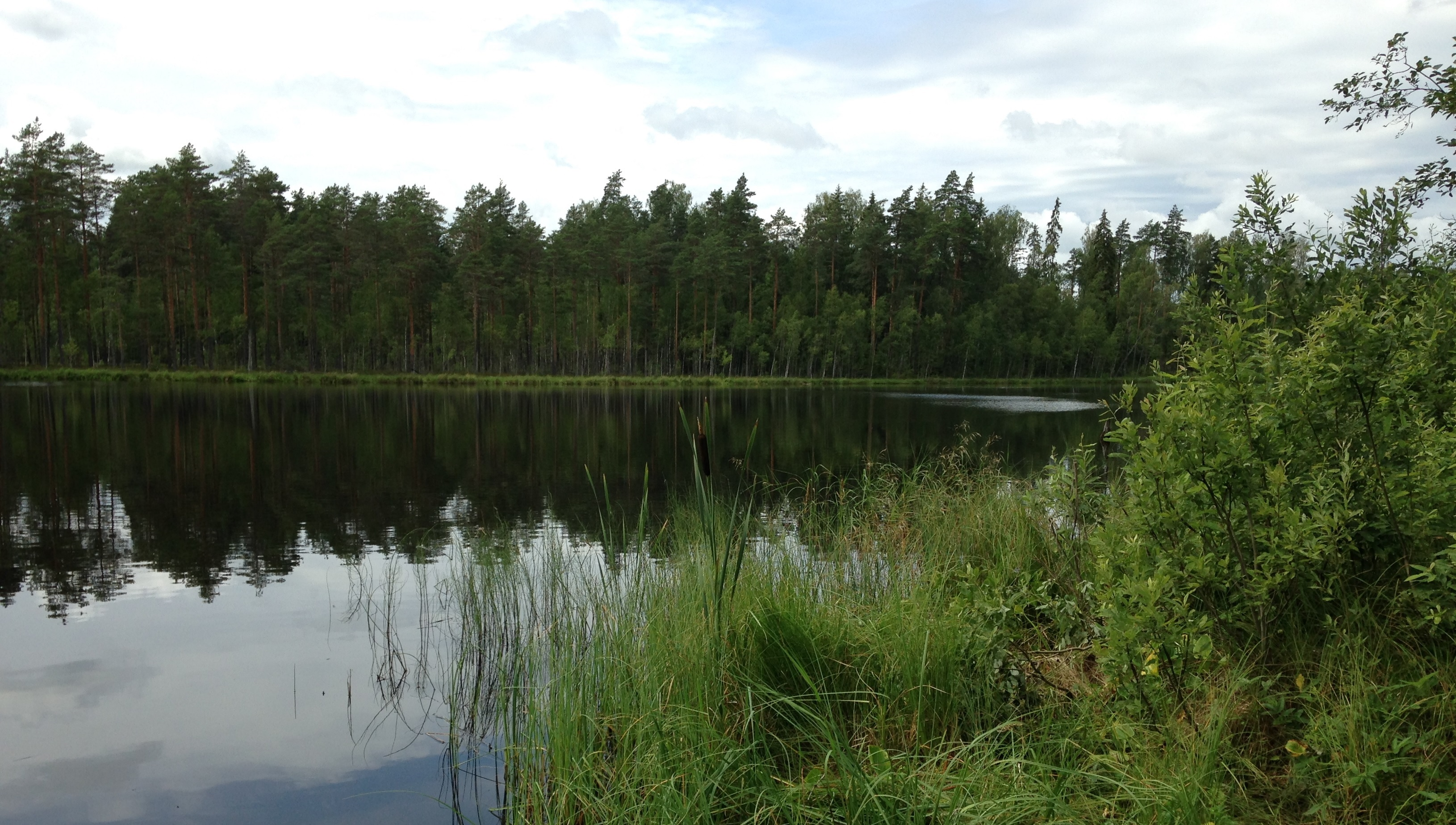 Nauska järv